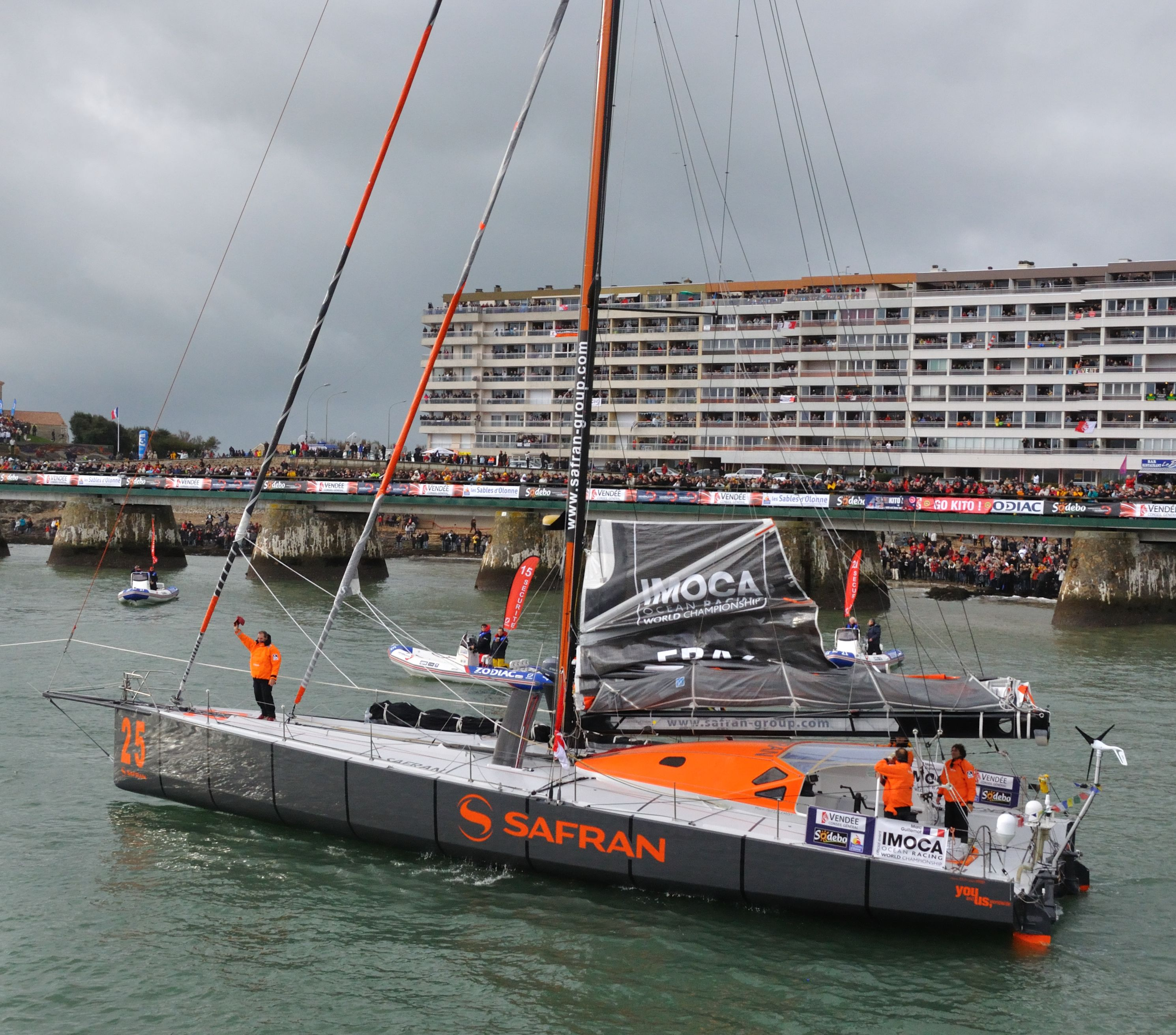 Vendée Globe 2012-2013 : Marc Guillemot sur Safran au départ des Sables d'Olonne